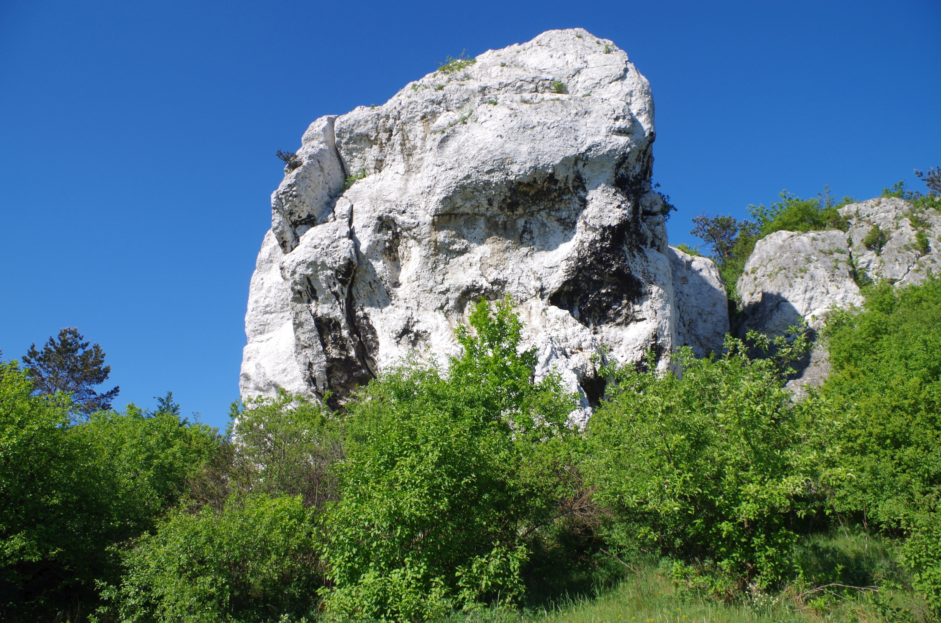 Skały Rzędkowickie. Studnisko